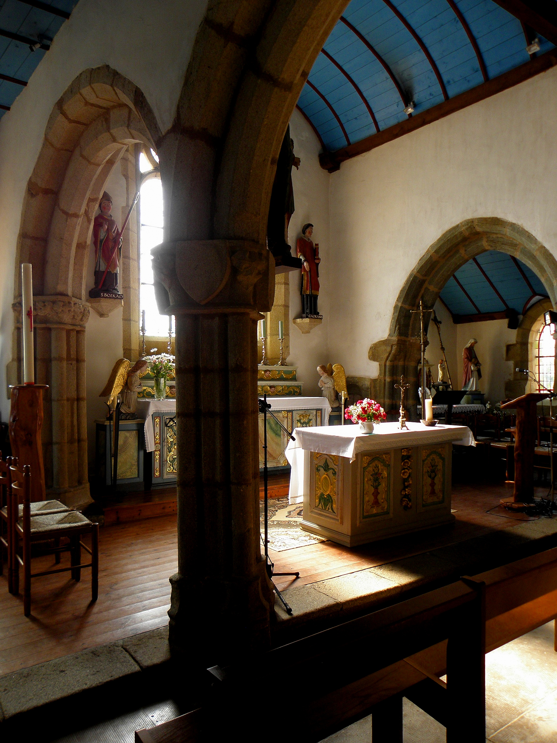 Intérieur de l'église Saint-Boscat de Tréogat (29). Vue transversale du chœur. .